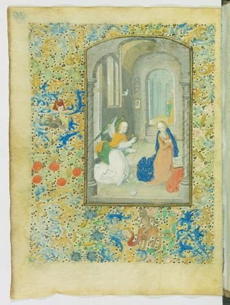 Verkündigung an Maria